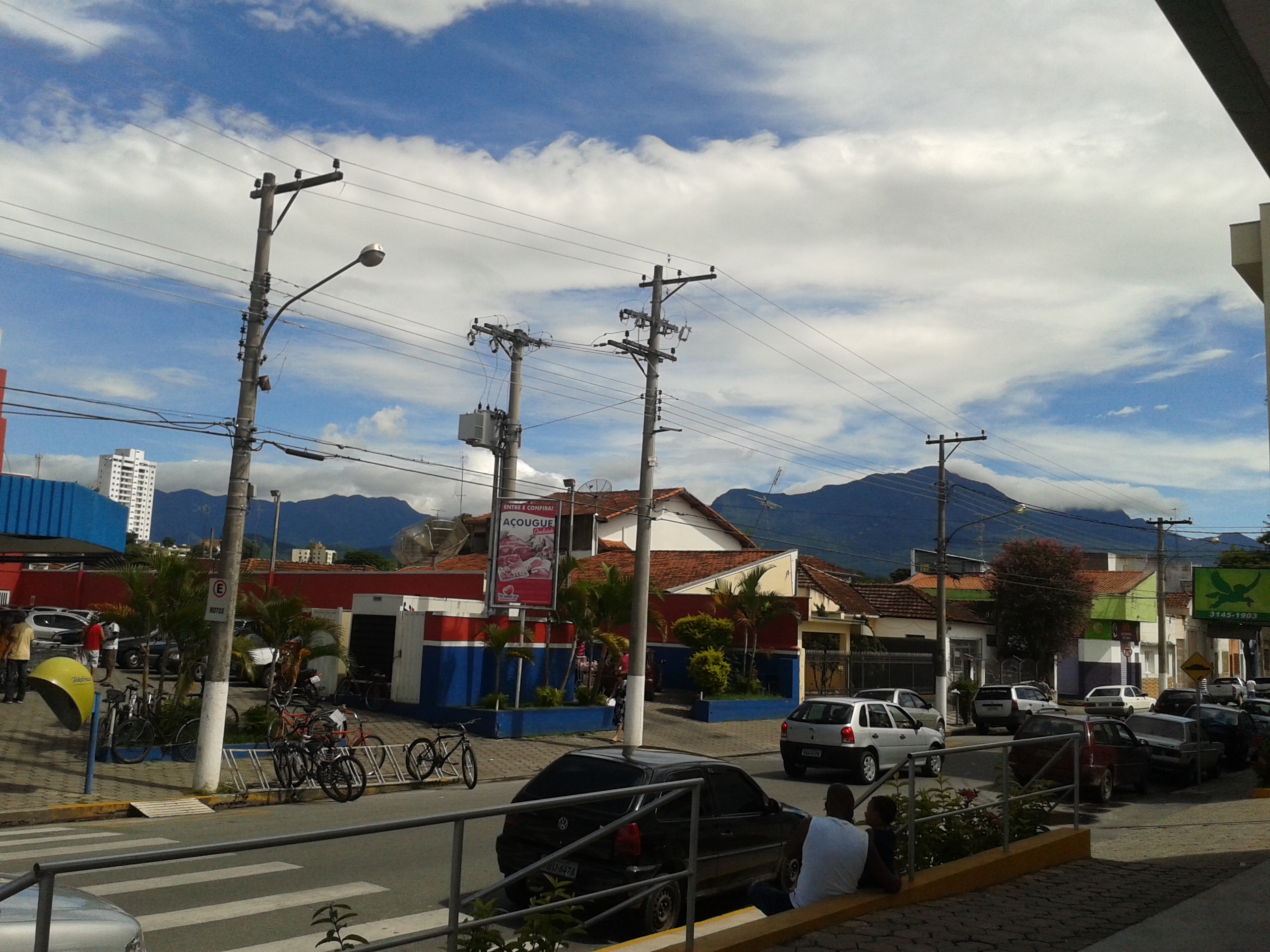 Cidade de Cruzeiro, e Serra da Mantiqueira — São Paulo.